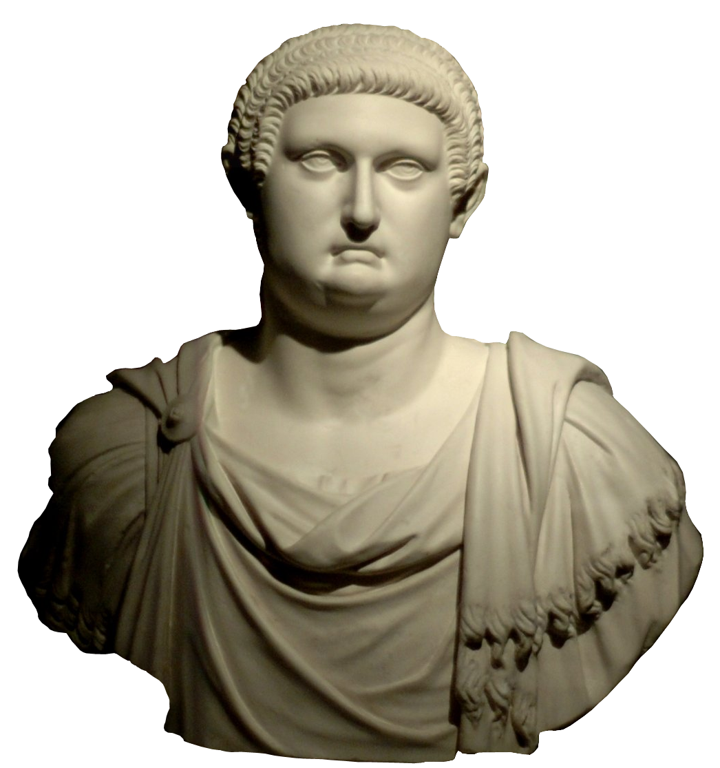 Busto di Otone scontornato